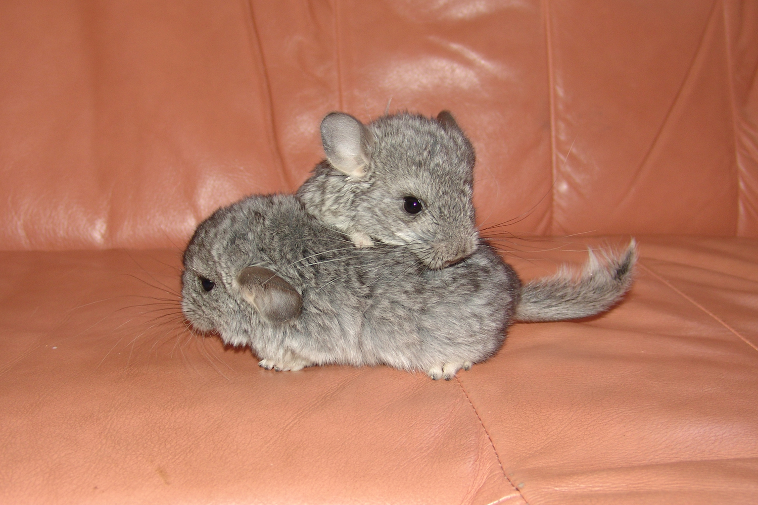 Детёныши шиншиллы